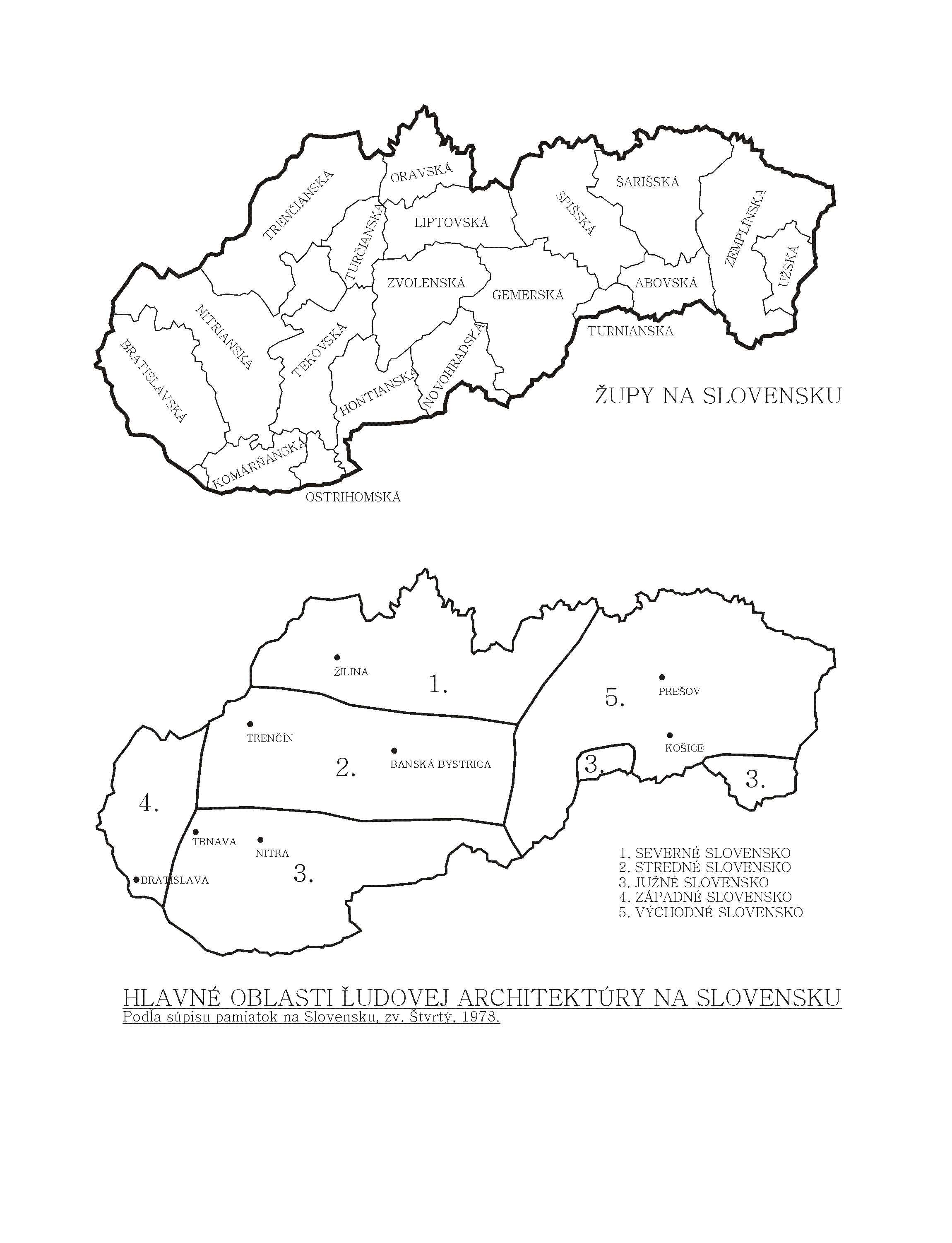 Oblasti lidové architektury na Slovensku. V horní části snímku pro srovnání uherské župy z odobí před rokem 1918